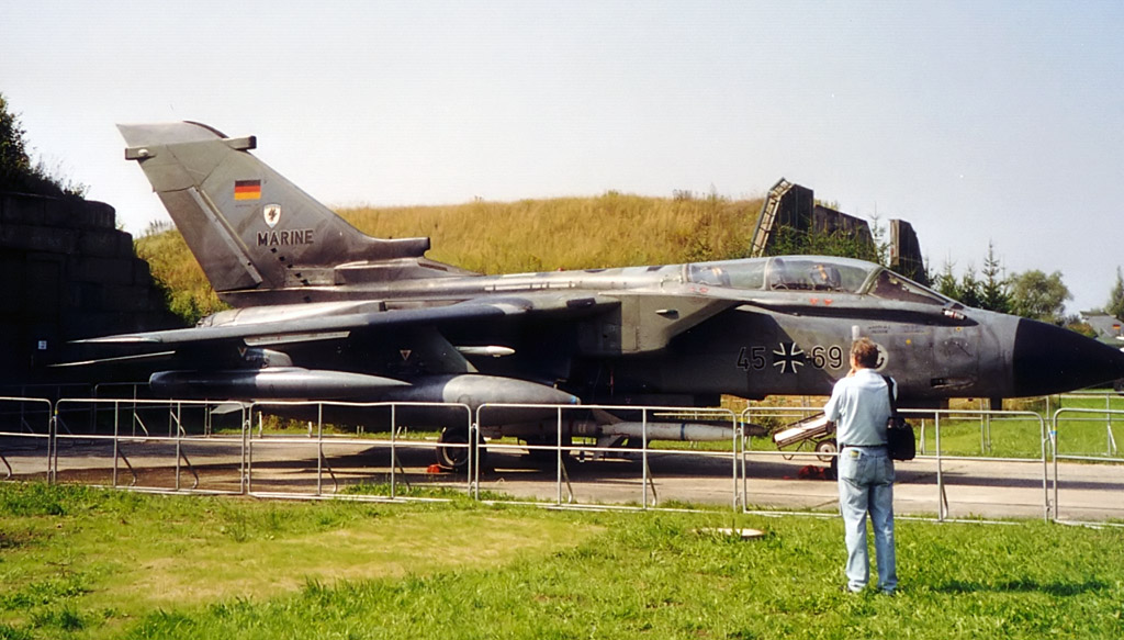 Beschreibung: Panavia Tornado vor einem Hangar in Laage Image taken by Darkone